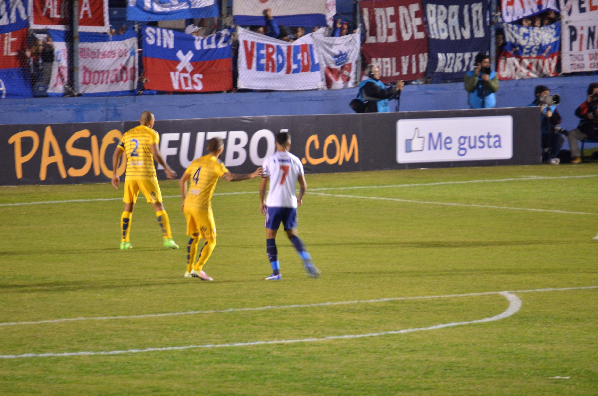 Imagen del partido disputado entre Nacional y Boca Juniors, en el estadio Gran Parque Central, por los cuartos de final de la Copa Libertadores 2016